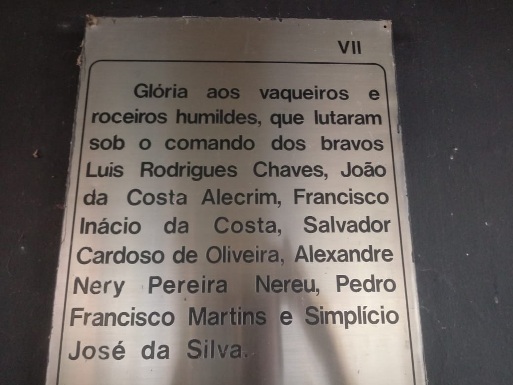 Placa no local da batalha do Jenipapo com a relação de lideranças do referida batalha.